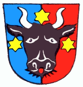 Bukowina